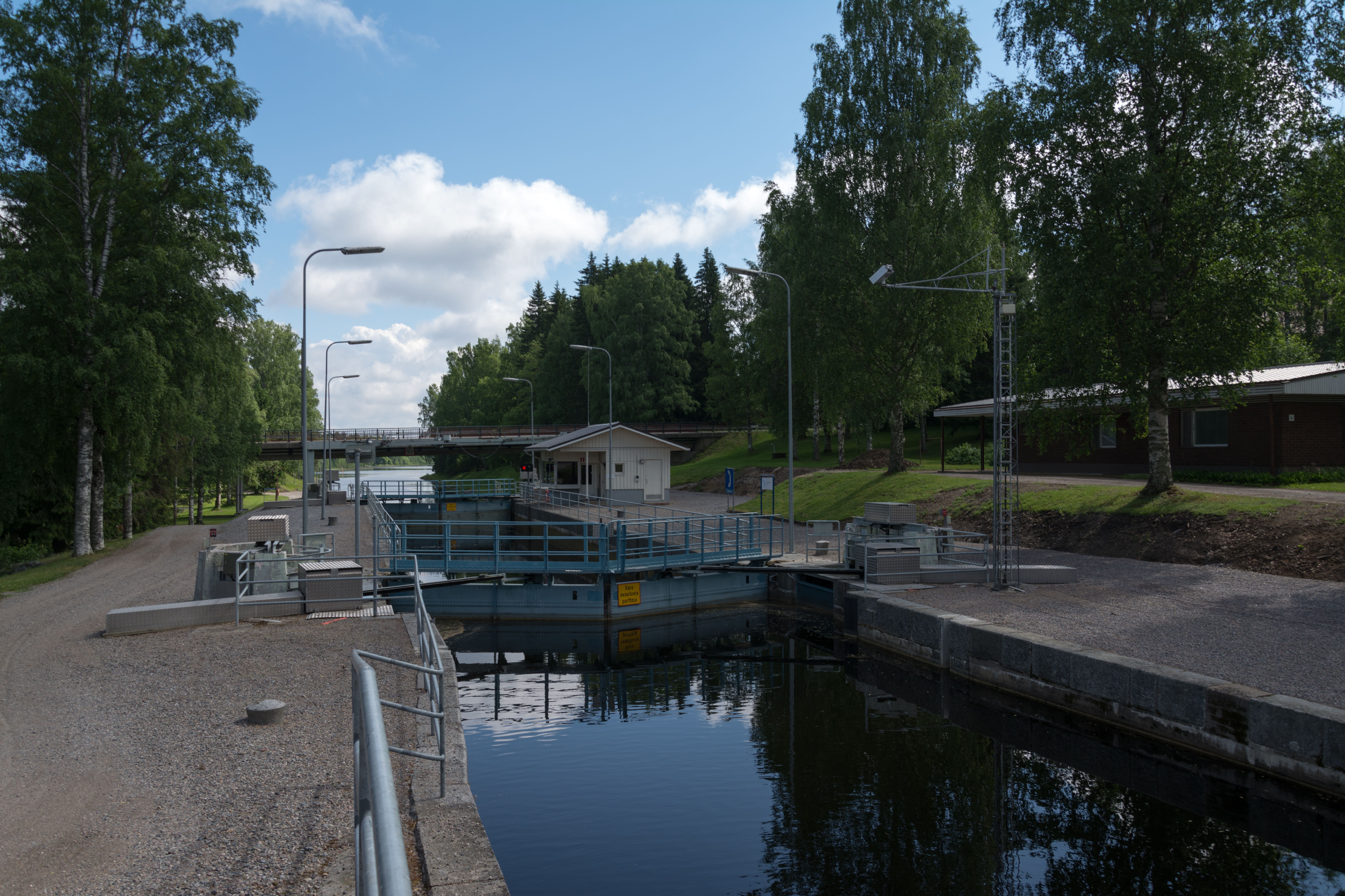 Kerkonkosken kanava Rautalammilla